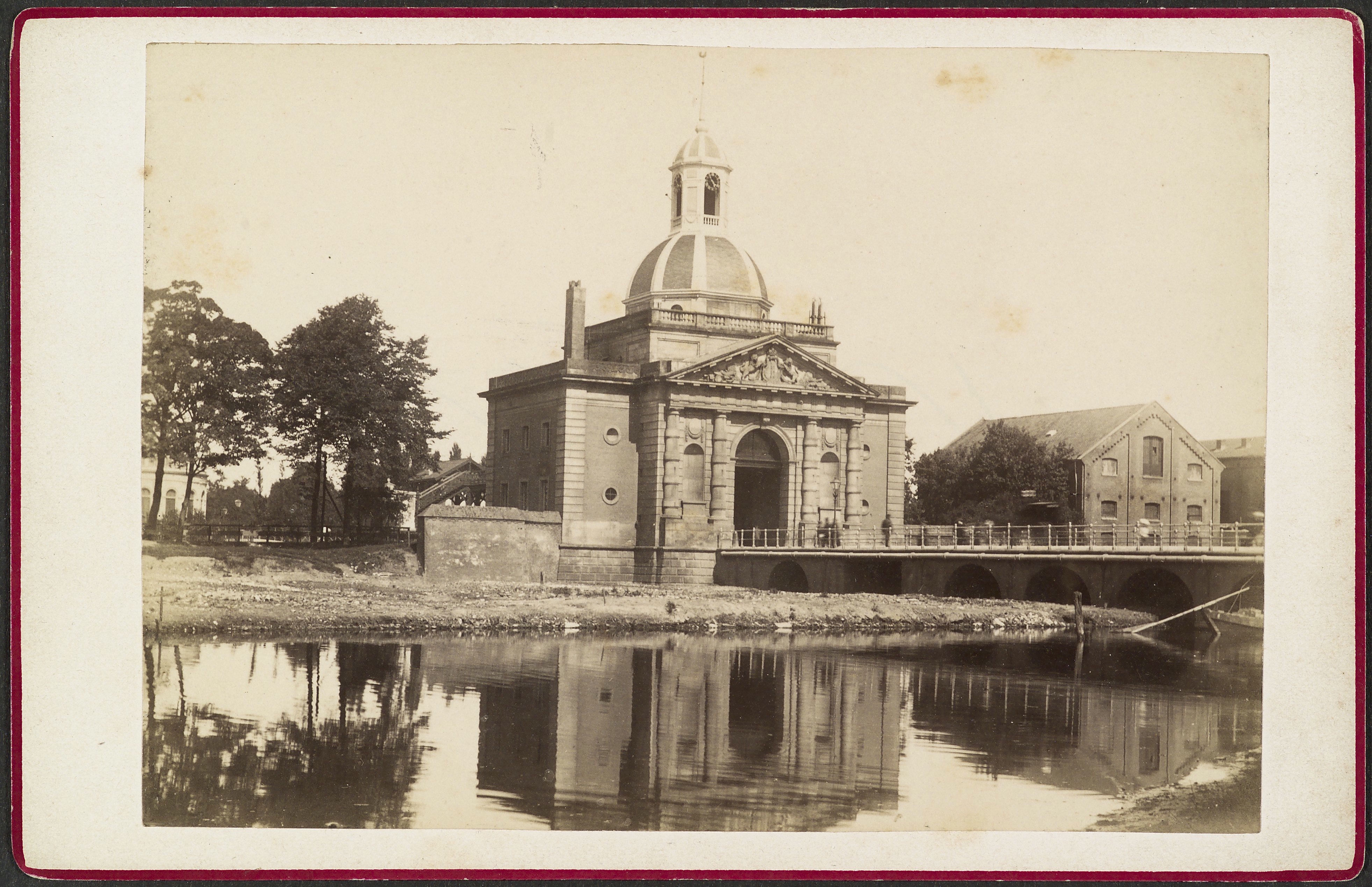 Muiderpoort: De Muiderpoort, gezien vanuit het zuiden, van buiten de stad bereikbaar via een lange brug (opmerking: Kabinetfoto)